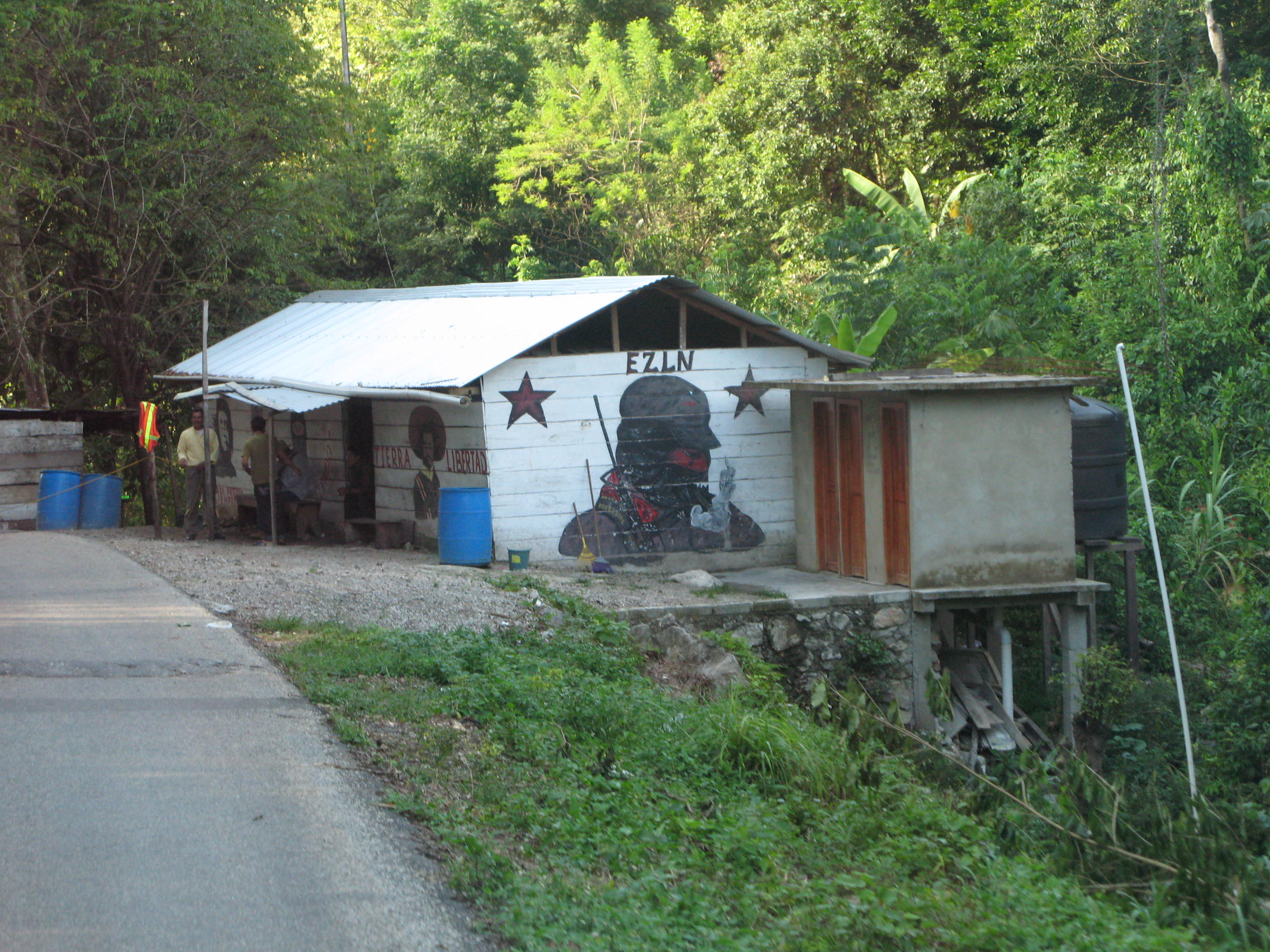 Kontrolna točka zapatistov v bližini Aqua Azul, Mehika.